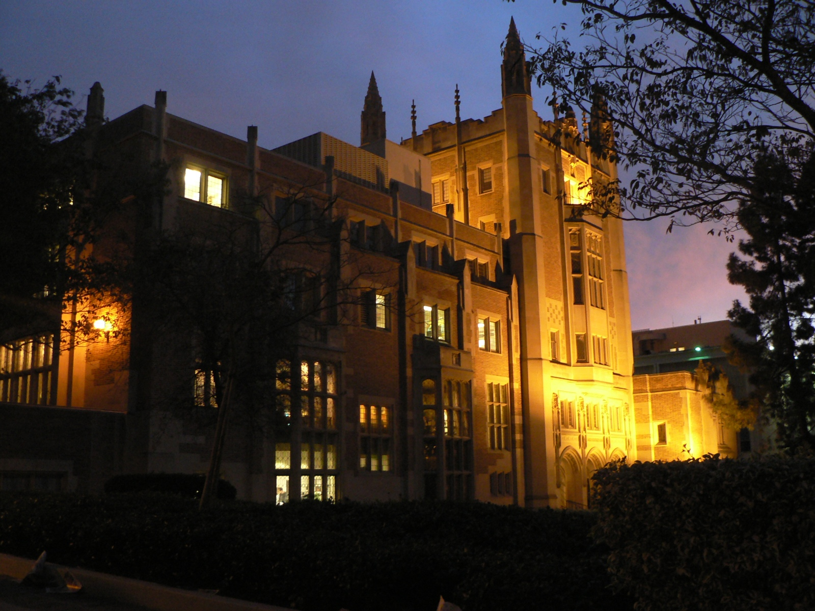 UCLA